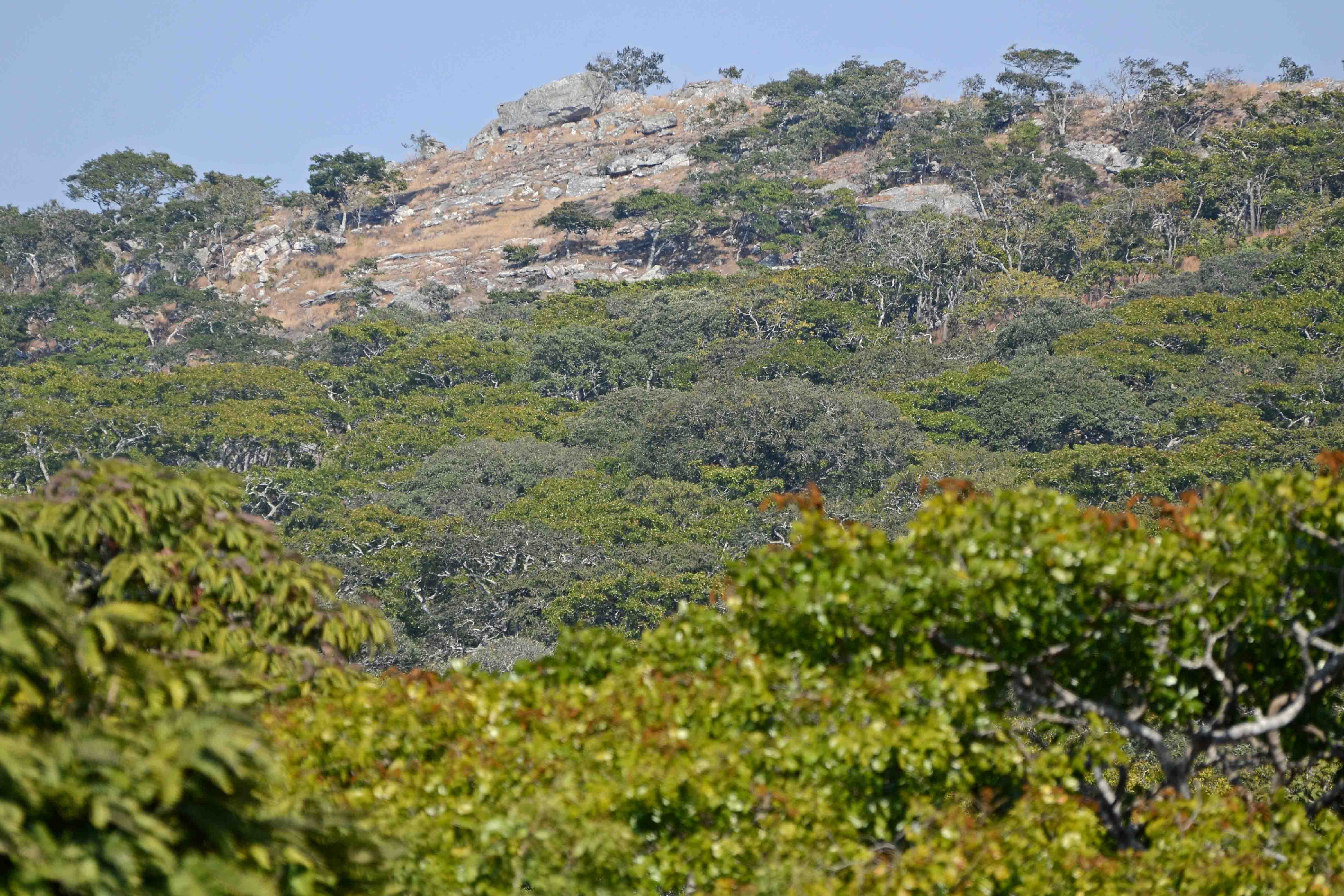 Nkhotakota, Malawi